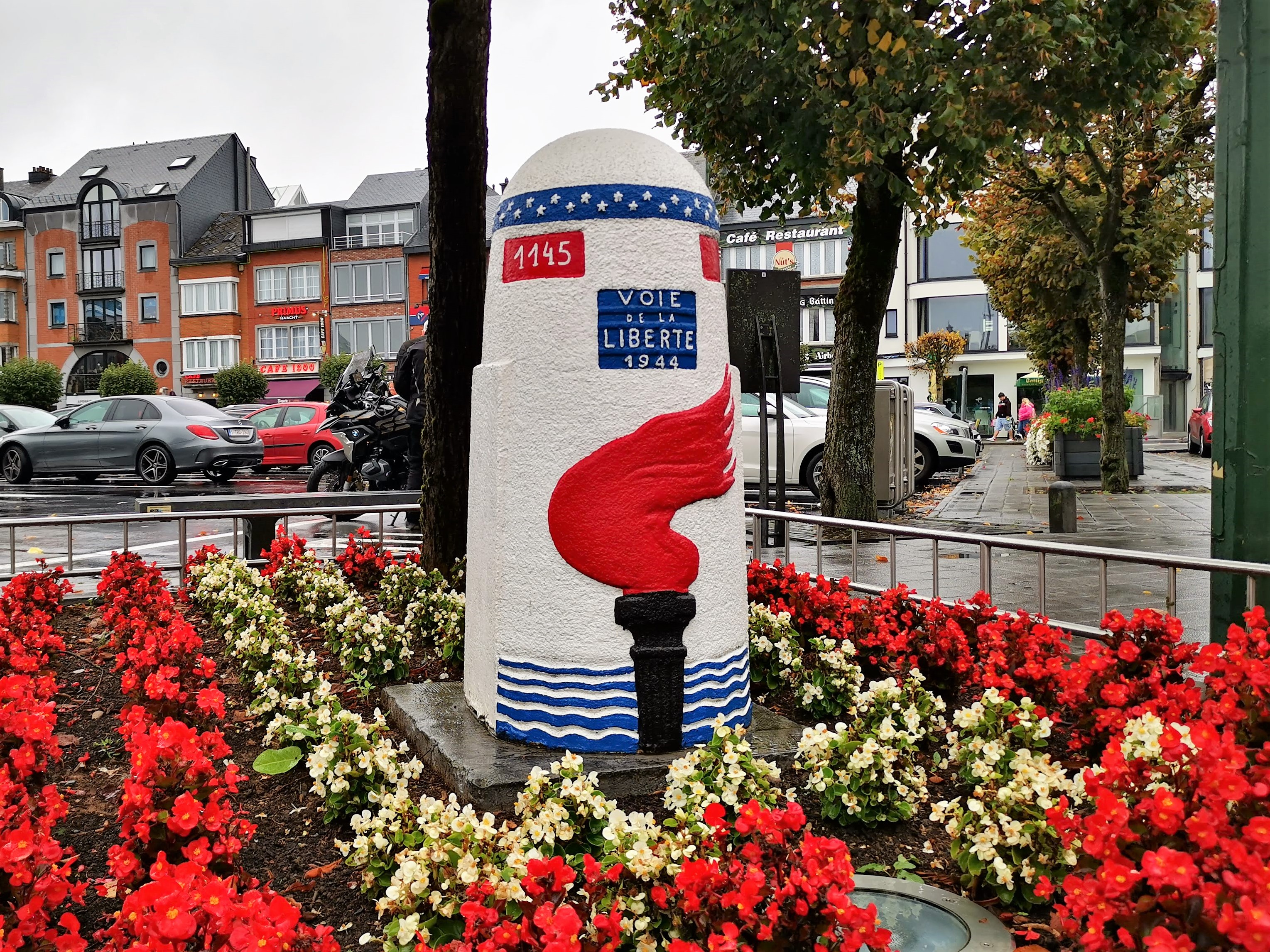 Bastogne, Place Mac Auliffe. Borne 1145 "Voie de la liberté".